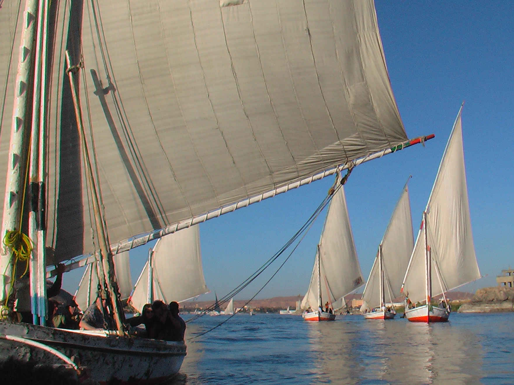 Felucken auf dem Nil bei Assuan Januar 2006 Author: Renbo